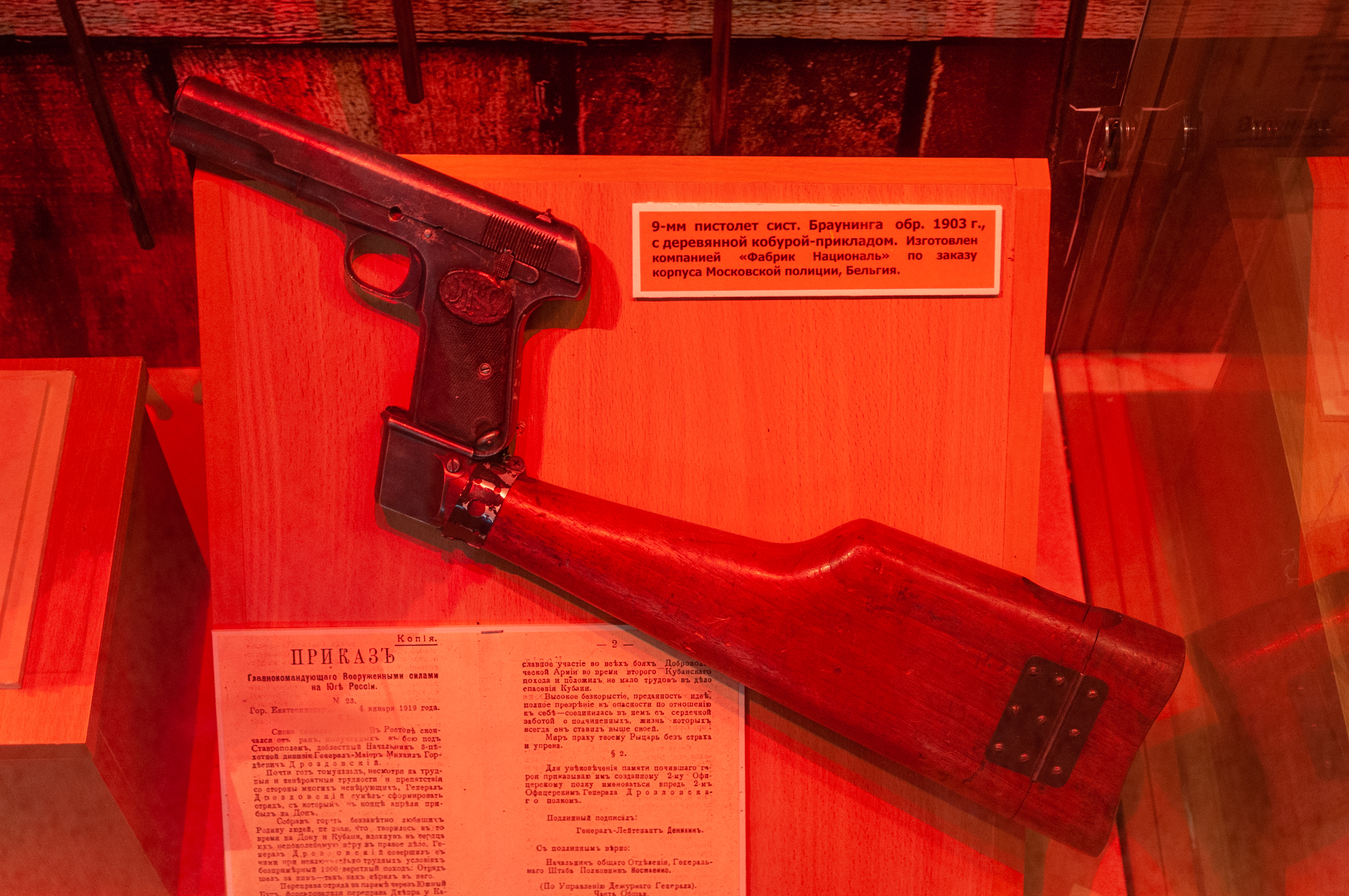 Pistolet FN Browning 1903 au musée central des forces armées russes